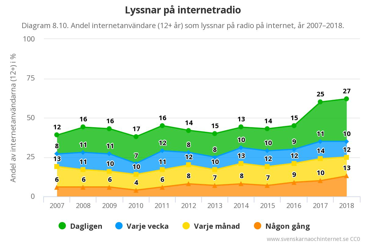 Andel svenska internetanvändare (12+ år) som lyssnar på radio på internet, år 2007–2018. Siffror från undersökningen "Svenskarna och internet 2018".